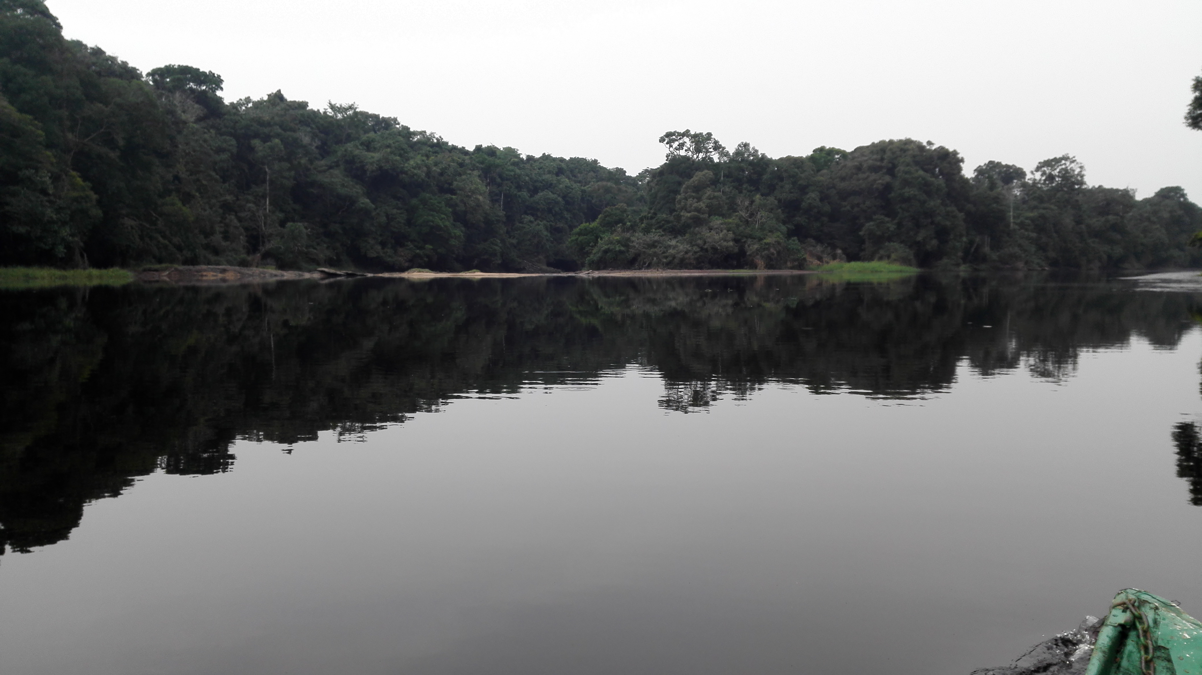 Paysage d'Ebogo, vue du Nyong, Site écotouristique d'Ebogo, Région du Centre, Cameroun.